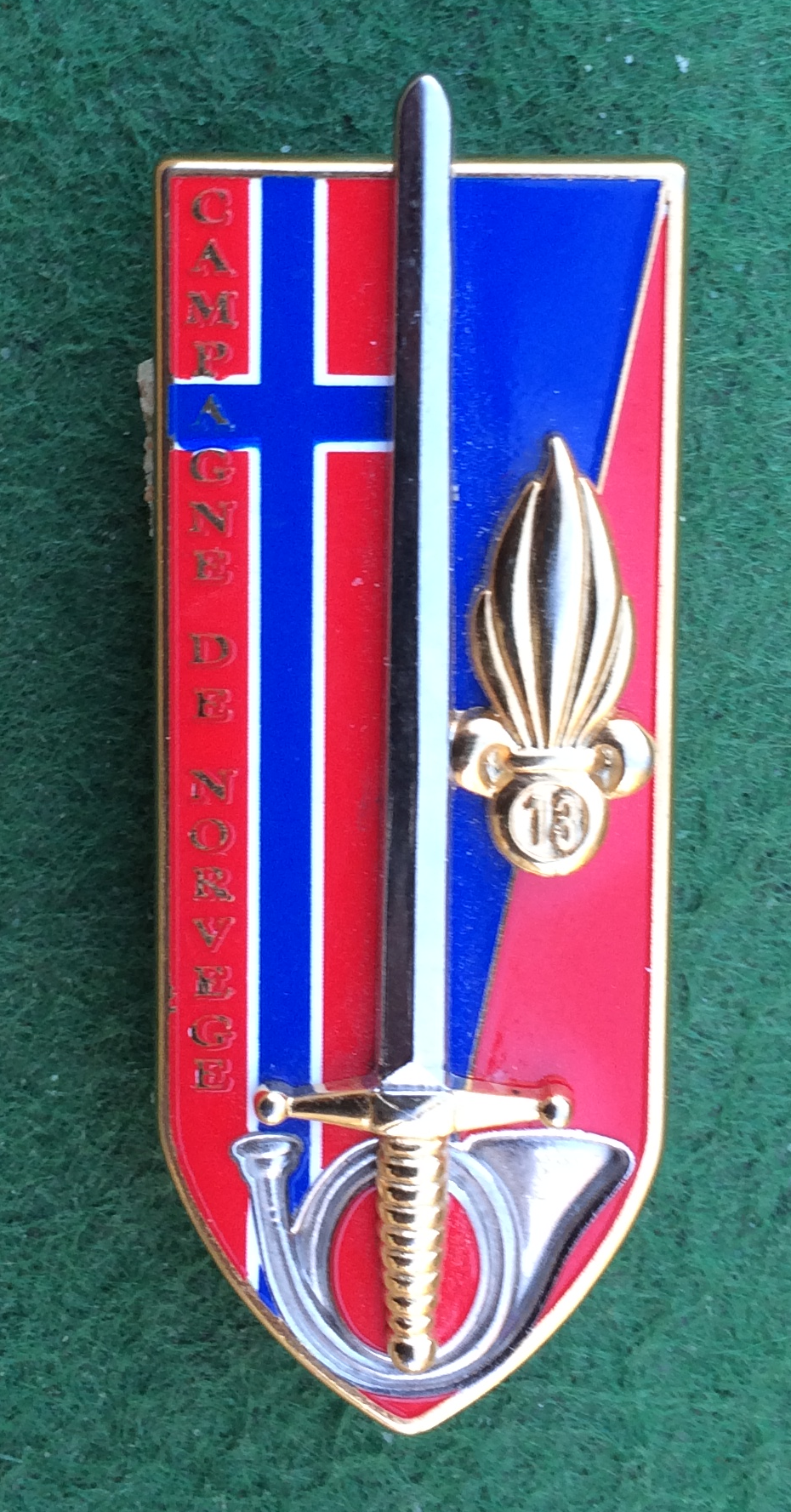 Insigne de la promotion «Campagne de Norvège» du 4e bataillon de l'ESM de Saint-Cyr de 2001. Il évoque la participation française en 1940 à une force franco-polonaise formant le corps expéditionnaire en Scandinavie. On trouve sur l'insigne la grenade de la demi-brigade de marche des volontaires de la Légion étrangère (13e DBMLE), ainsi que le corps pour les deux demi-bigades de Chasseurs alpins, sur un fond reprenant le drapeau norvégien (à gauche) et l'insigne de l'ESM Saint-Cyr (à droite) avec l'épée des officiers, pour cette promotion particulière qui réunit les derniers EOR (élèves officiers de réserve) et les premiers OSC (officiers sous contrat). (Arthus Bertrand - Paris)